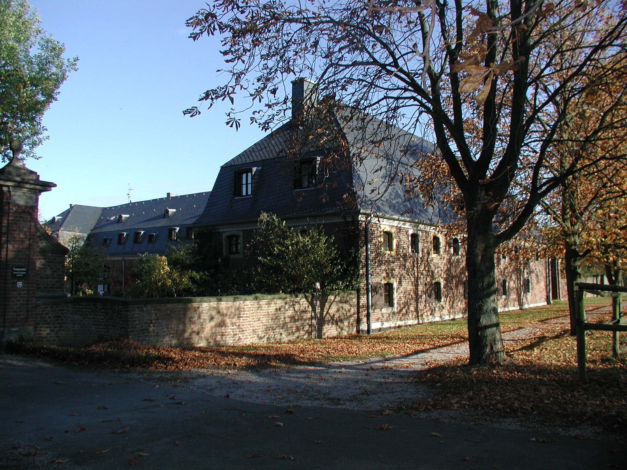 Bornheim-Rösberg, Burg Rösberg